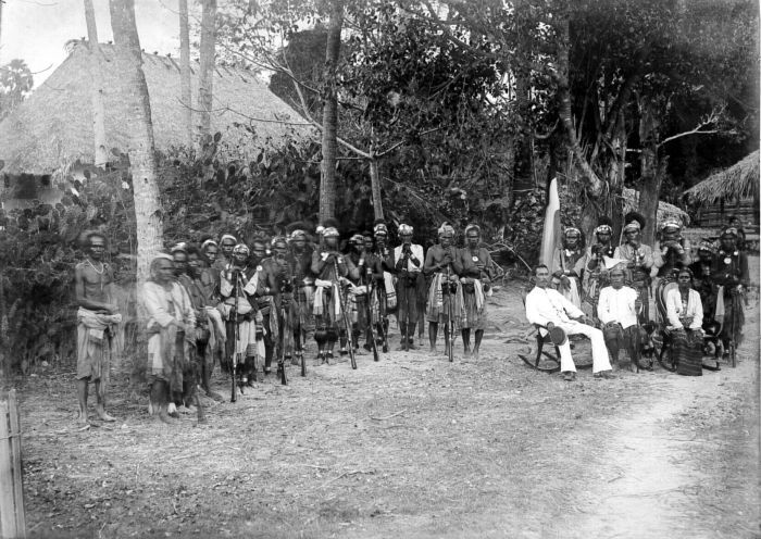 Negatief. Fettor Molo met gevolg te Babaoe, Timor